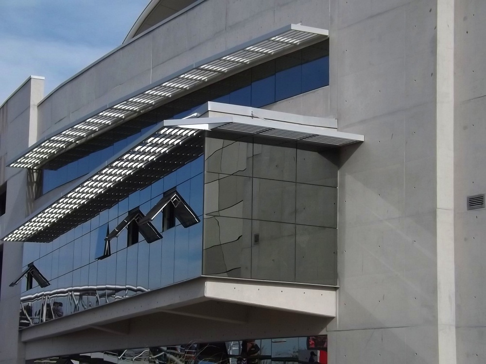 Espacio Julio Le Parc, en Guaymallén (Mendoza, Argentina).